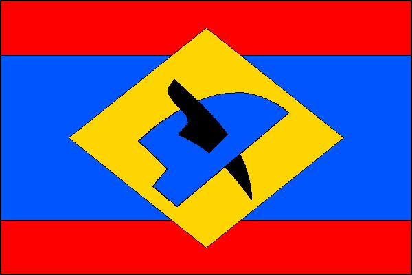 Vlajka obce Úsobrno